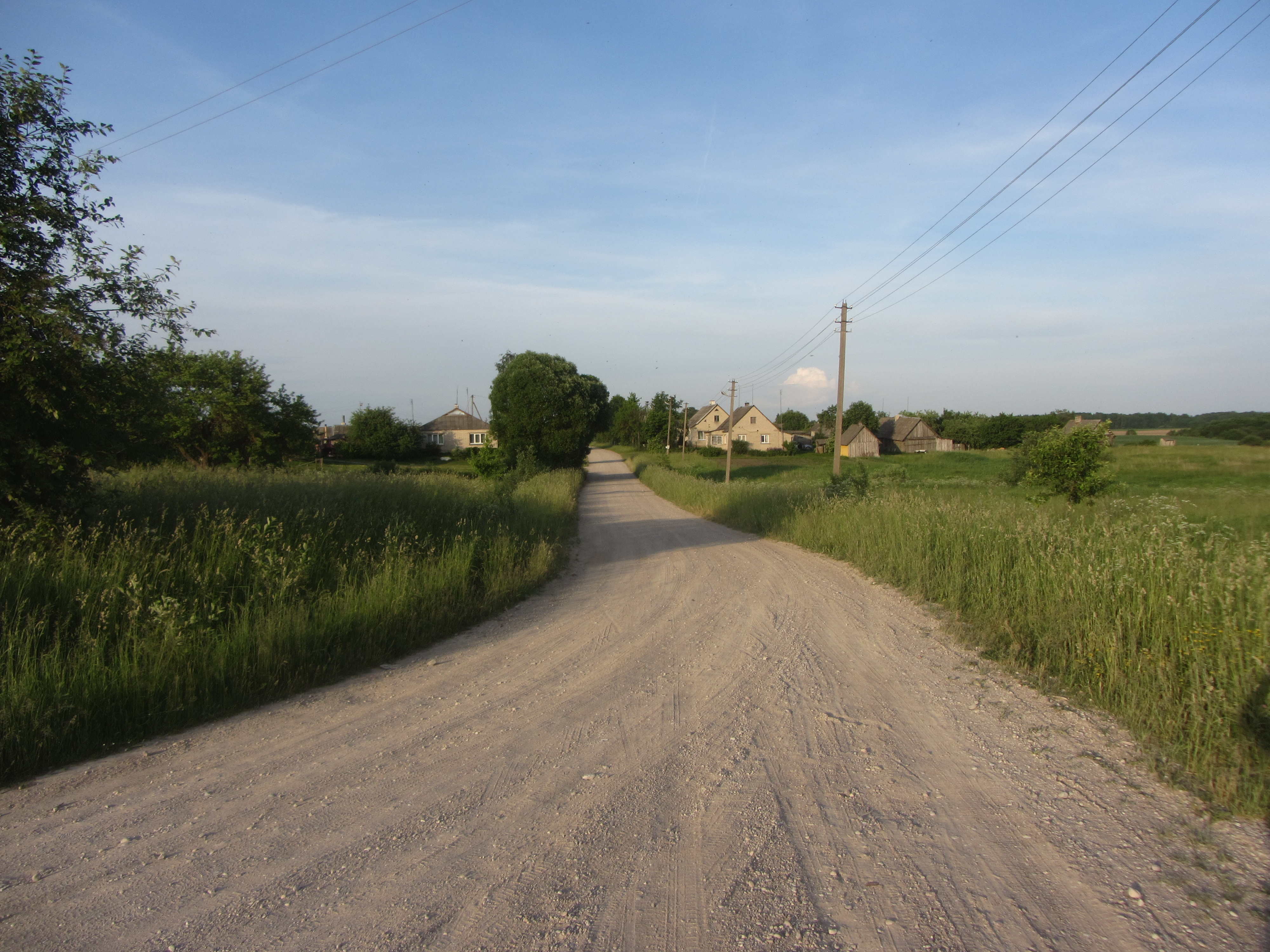 Keižonys, Lithuania